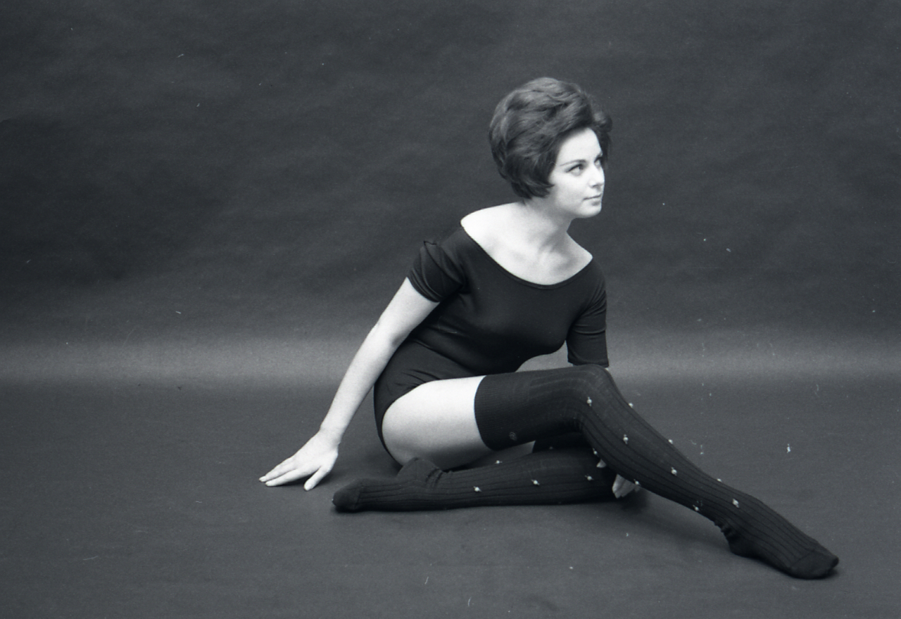 Servizio fotografico : Milano, 1964 / Paolo Monti. - Strisce: 5, Fotogrammi complessivi: 20 : Negativo b/n, gelatina bromuro d'argento/ pellicola ; 35 mm. - ((I fotogrammi hanno una doppia numerazione. - Sul portanegativi: Leica Agfa 21°. - Sul dorso del portanegativi Monti specifica: "Studio Senigaglia". - Nel 1965 Erika Jorger partecipò come Miss Italia a Miss Mondo. - Fonte: Agenda di Paolo Monti: Foto Leica 2 / 111 - 285 (1934-1965), presso Archivio Paolo Monti